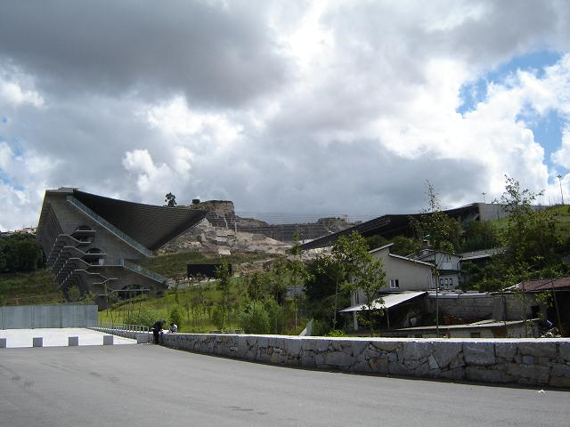 Estádio Municipal de Braga, Portugal.